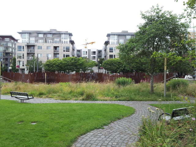 Tanner Springs Park, Portland, Oregon (2013)